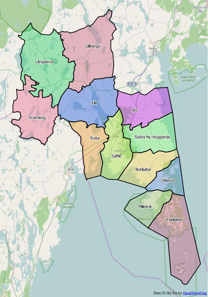 Distriktsindelningen i Sundsvalls kommun World file: 92.41428579451955727 0 0 -92.41428579451955727 1689424.71163177466951311 8540150.44777901843190193